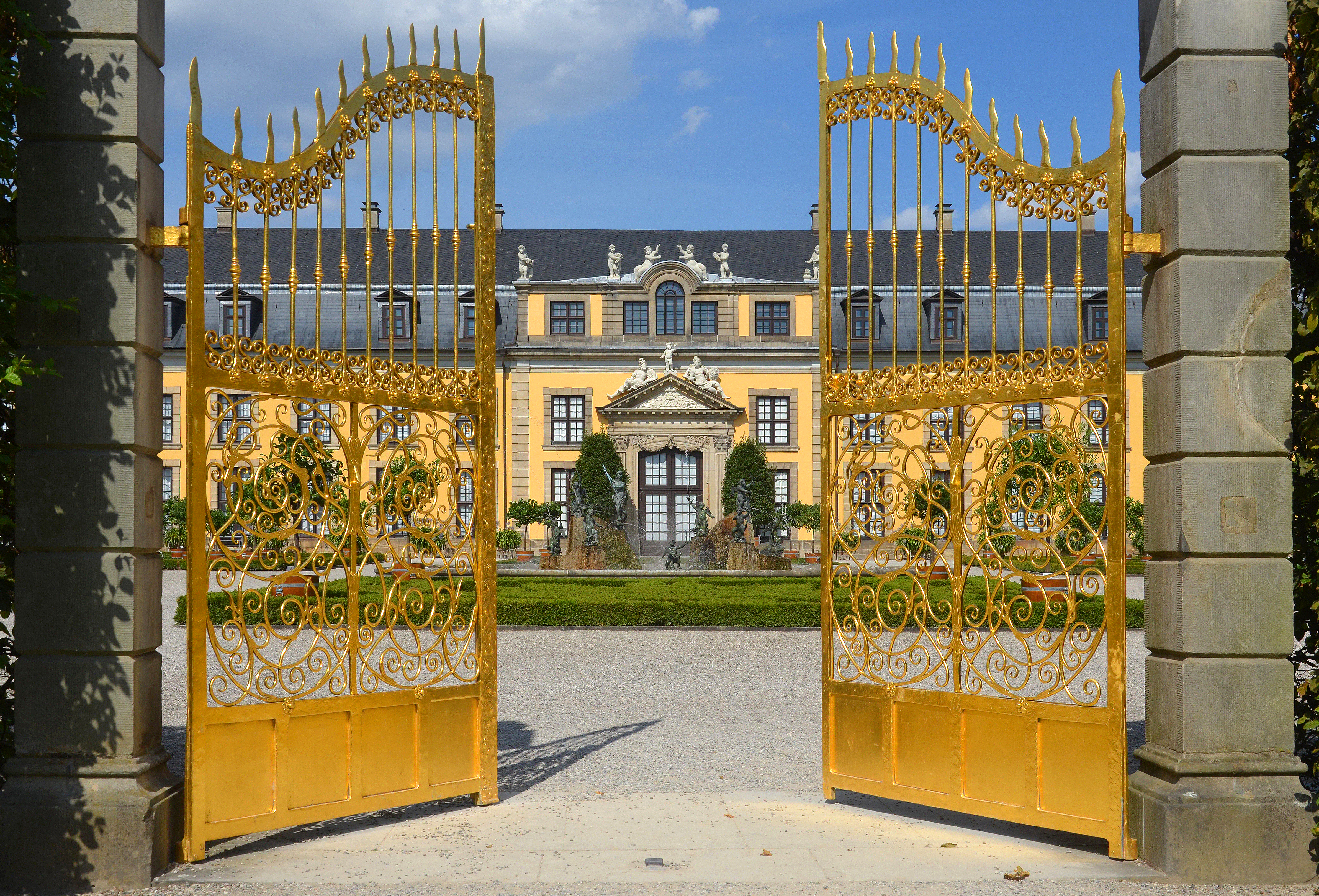 Während der 7. Hannoverschen Freiwilligenbörse am 28. August 2016 im Galeriegebäude im Großen Garten von Hannover entstand in Kooperation des Freundeskreis Hannover mit dem Wikipedia-Büro Hannover diese Aufnahme des Goldenen Tores, das in einer optischen Achse des 2008 umgestalteten Neptunbrunnens und dem Portal des dahinter errichteten Galeriegebäudes installiert wurde ...